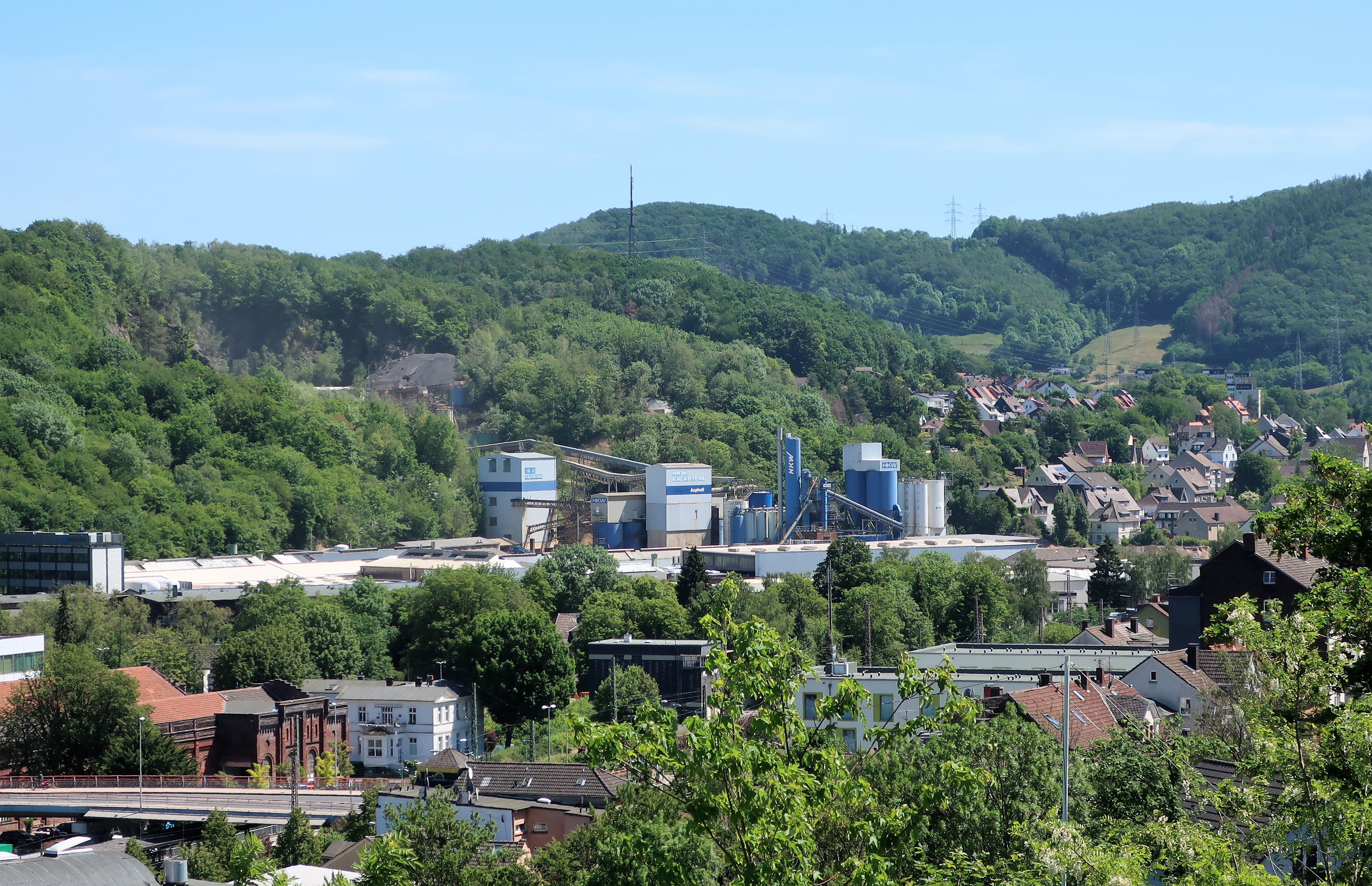 Blick auf das Betriebsgelände der Hohenlimburger Kalkwerke an der Oeger Straße in Hagen-Hohenlimburg. Oberhalb (Foto Mitte) liegt der Geschützte Landschaftsbestandteil 1.4.2.62 „Steinbruch Steltenberg“. Der Steinbruch Steltenberg selbst liegt im Landschaftsschutzgebiet Steltenberg, Oege.